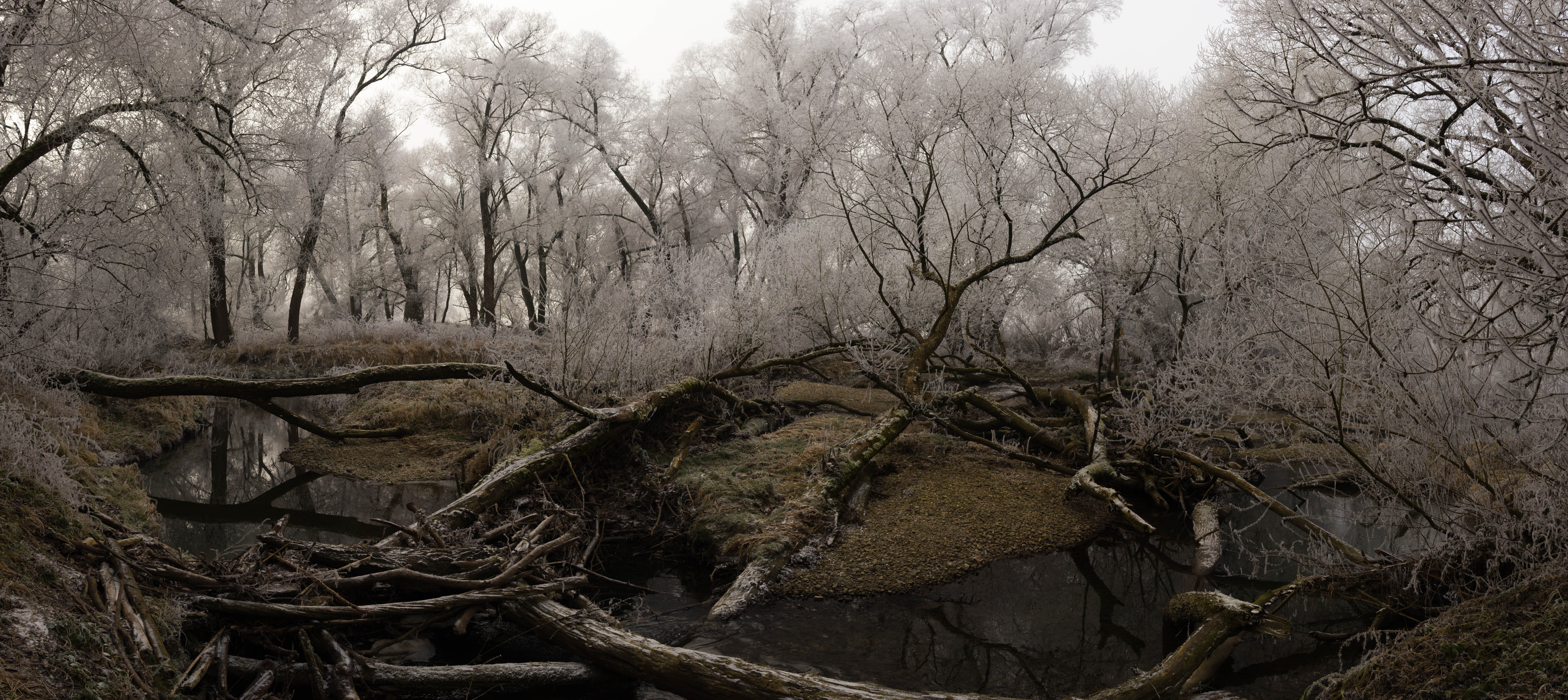 Dieses Panorama entstand aus 5 Hochformat Aufnahmen im FFH Isental im Landkreis Erding / Oberbayern. Die Aufnahme zeigt den Weiden Bruchwald kurz vor der Stadt Dorfen, welcher mit den angrenzenden Retensionsflächen zum Hochwasserrückhalt dient.